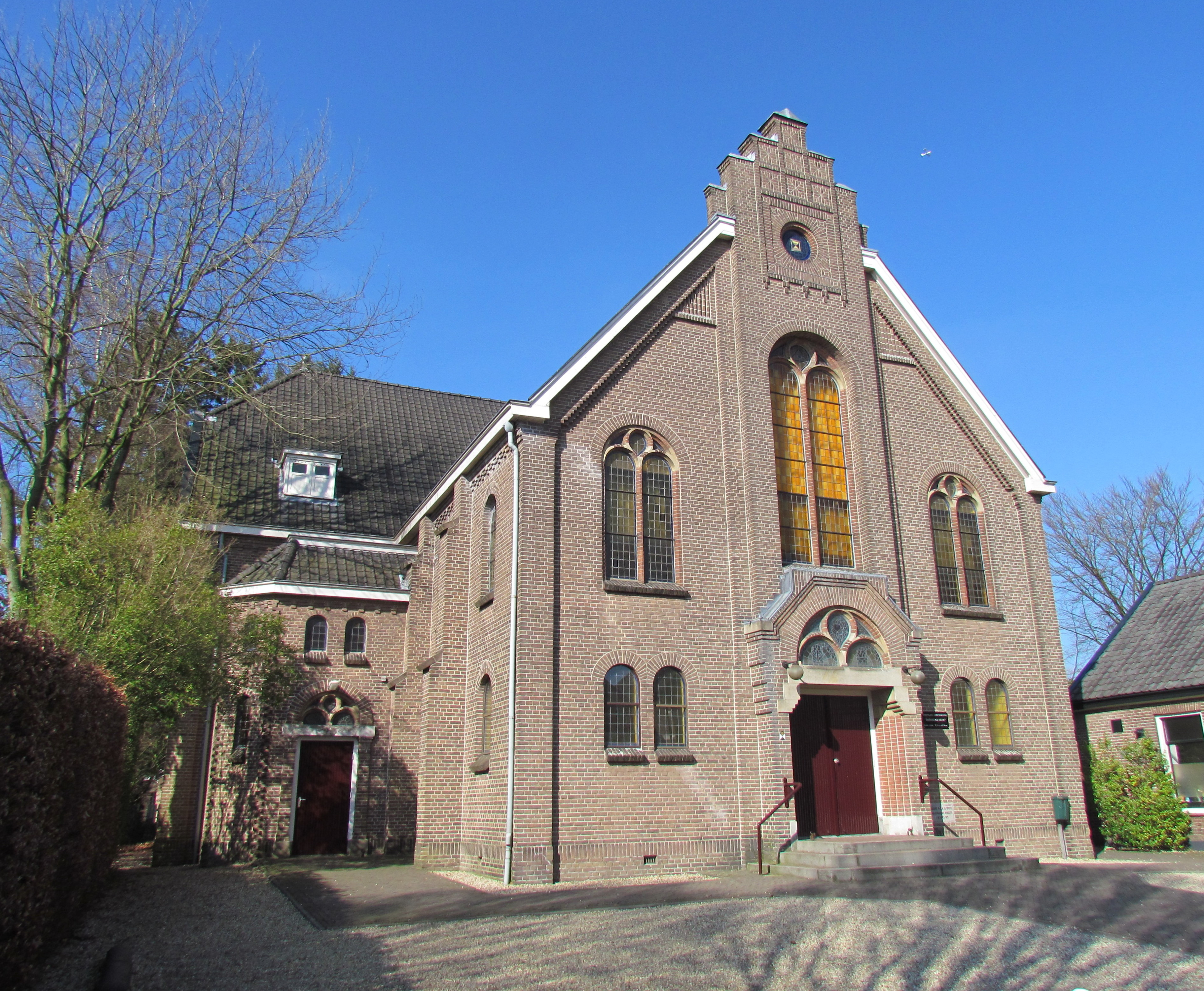 Barnabaskerk, Canadalaan 25 te Apeldoorn (NL). In gebruik door de Christelijke Gereformeerde Kerk